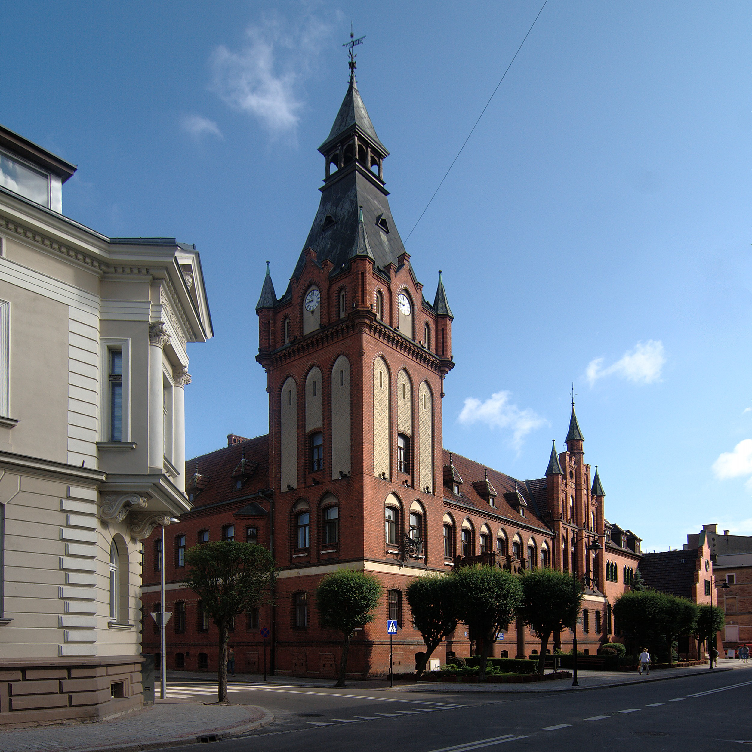 Ratusz w Lęborku.